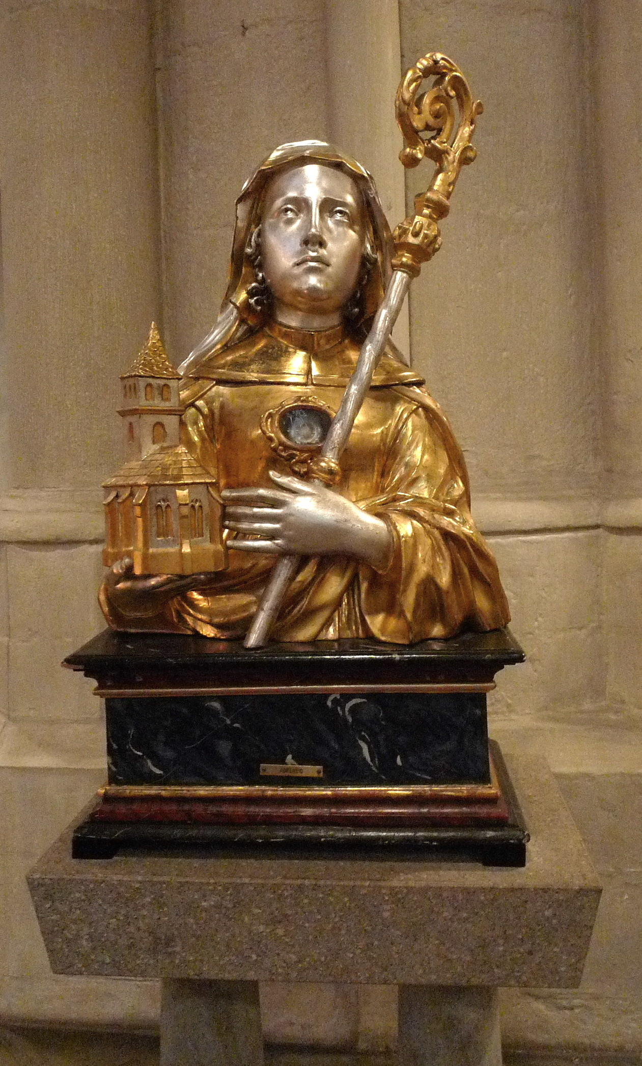 St. Peter (Bonn) – Adelheidis - Reliquienbüste (um 1650)